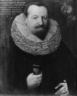 Gemälde in der Professorengalerie Tübingen